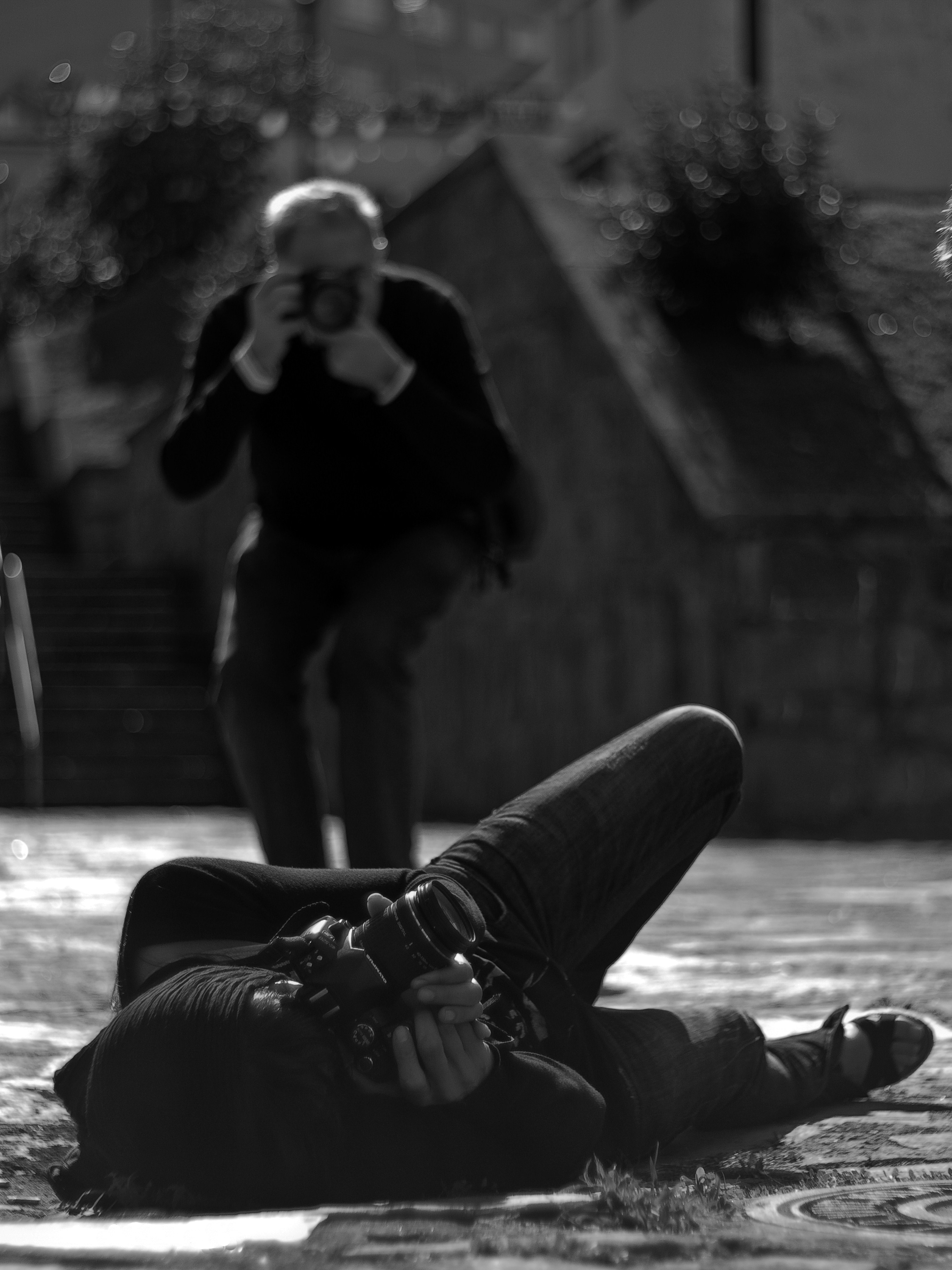 Focalización. Punto de vista. Galicia (Spain)